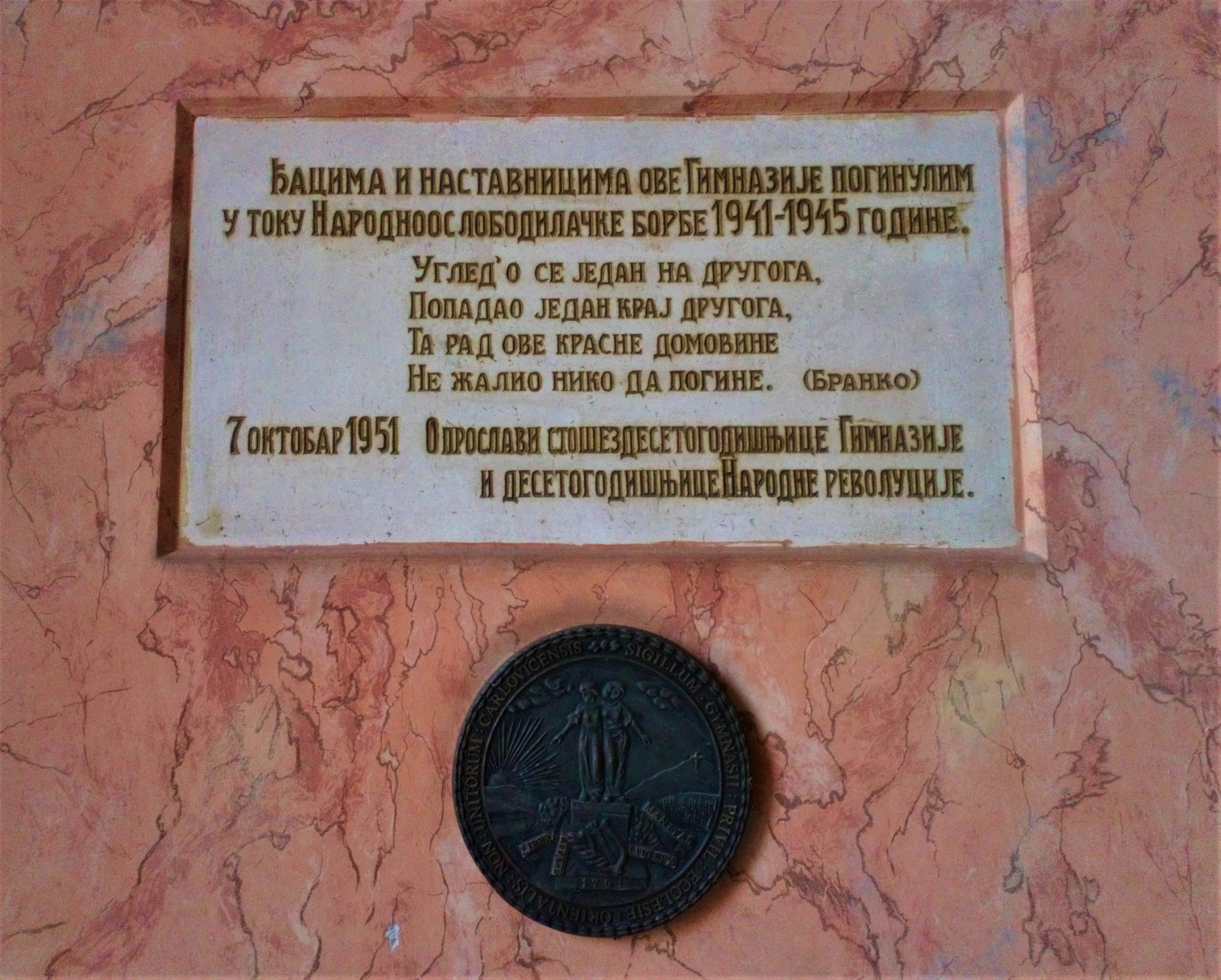 Srpski (latinica): Spomenik unutar Karlovačke gimnazije